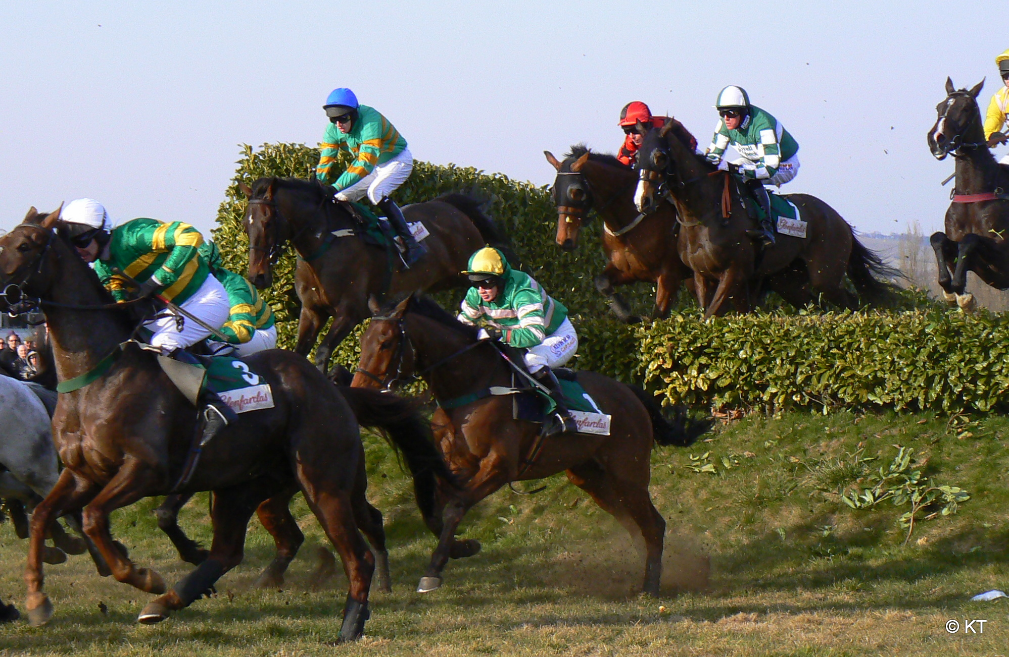 Cheltenham Festival 2010.